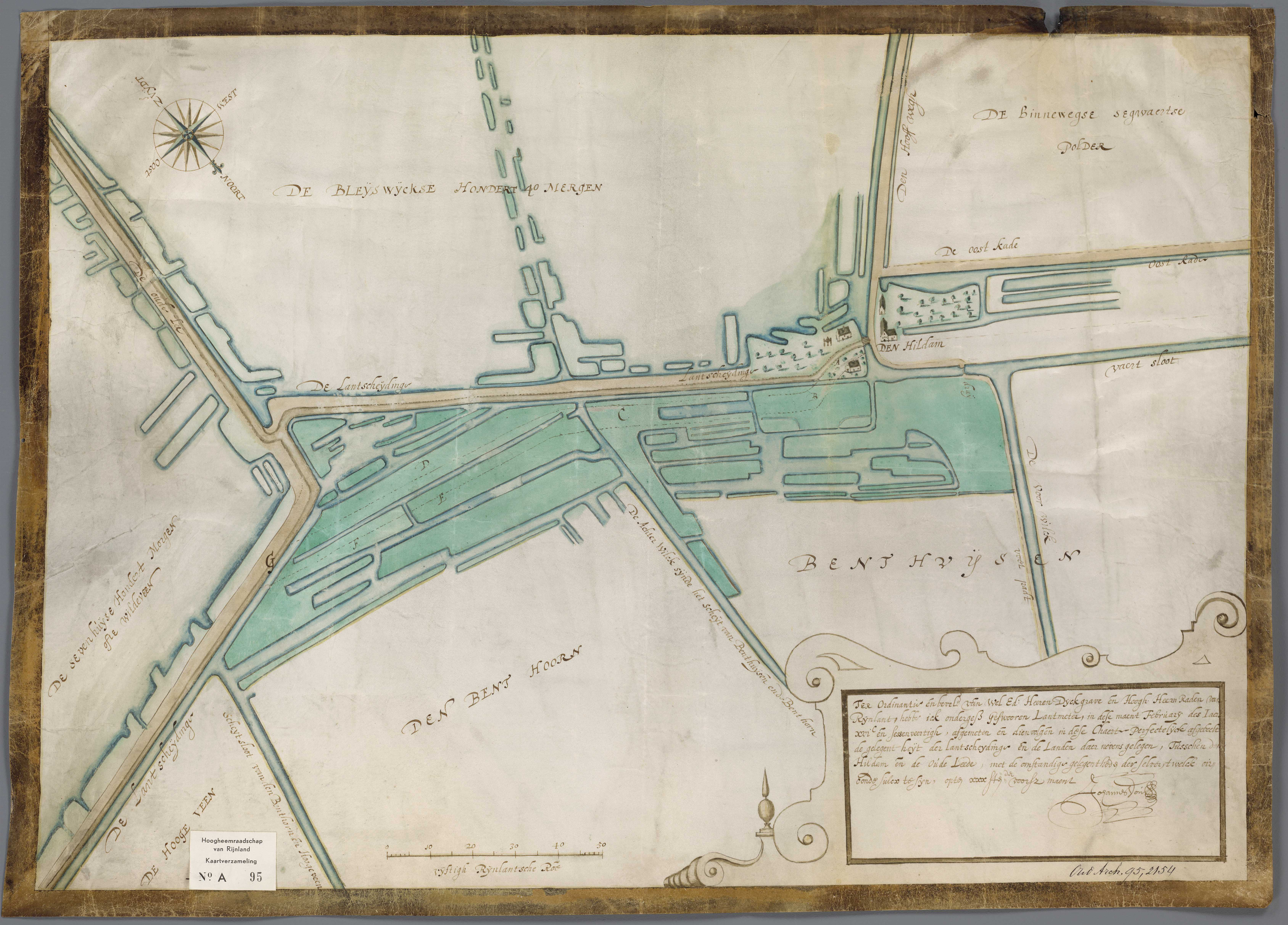 De Hildam op de dijk tussen Rijnland en Schieland. Schaalstok van 50 roeden = 96 mm. - Zuidwesten is boven. - Behoort bij stukken betreffende het verhogen van de landscheiding en van de Hildam.